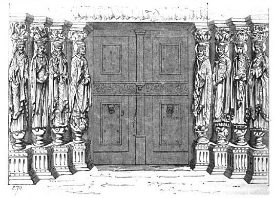 Grand portail